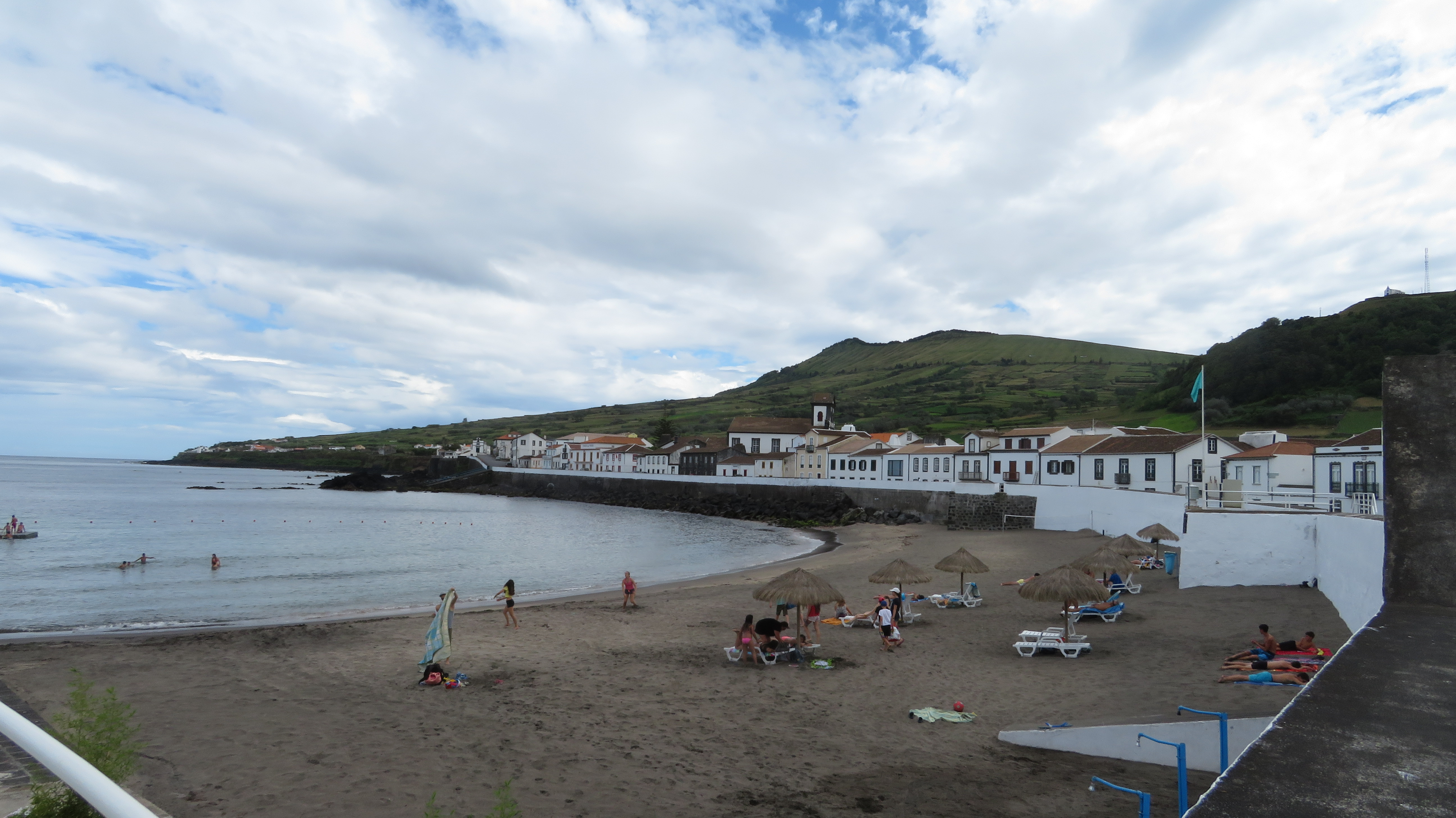 Centro da freguesia, São Mateus da Praia, Graciosa, Acores, Portugal